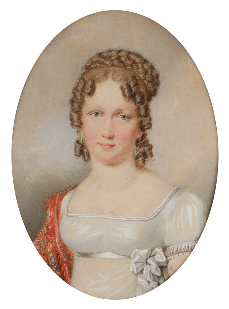 Мария Леопольдина (императрица Бразилии), 1820 r.